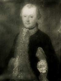 Portrait of Christoph von Derfelden (1681-1750)